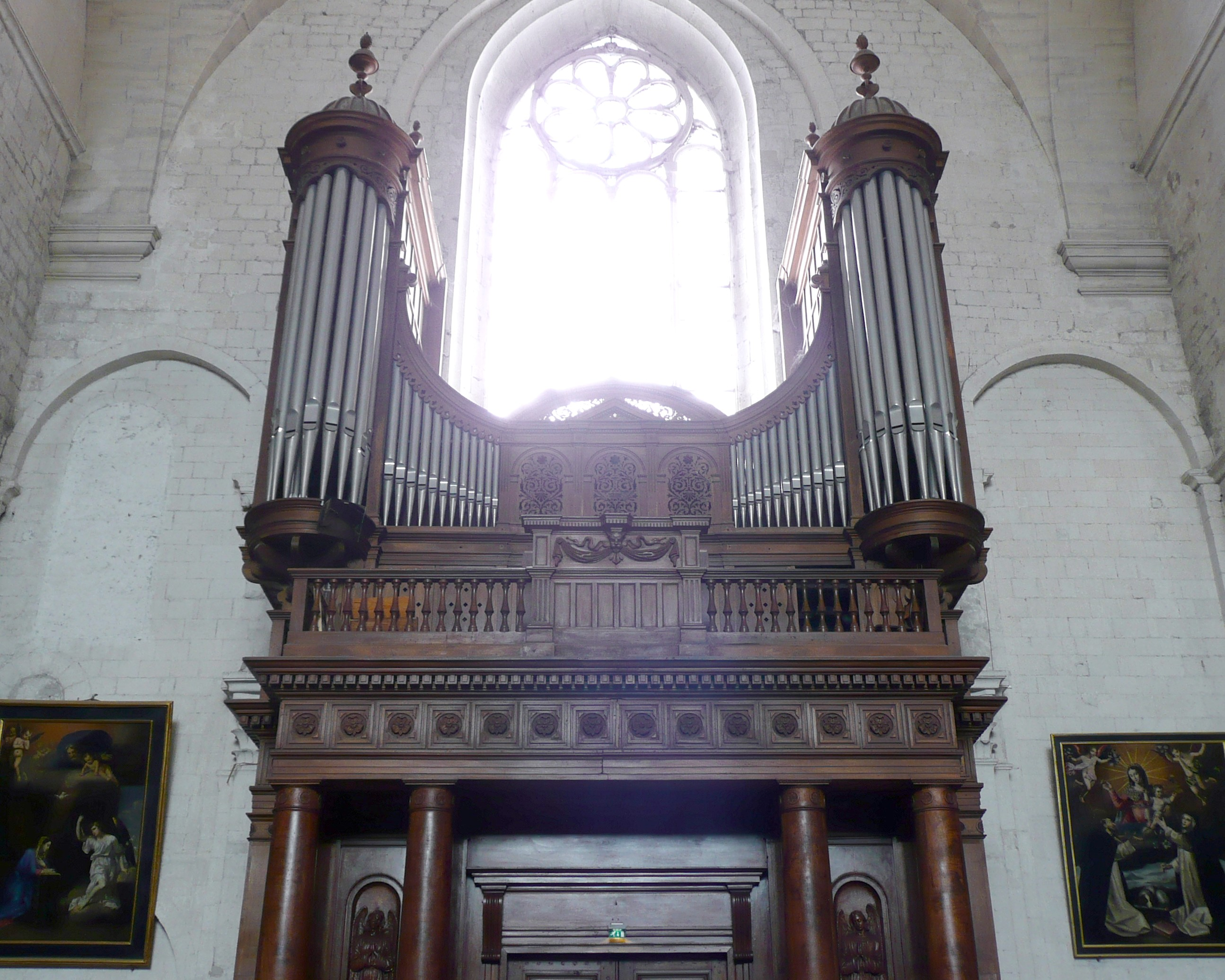 Viviers (Ardèche, France), cathédrale saint Vincent, orgue de tribune, construit originellement par le facteur parisien John Abbey en 1841; transformé et adapté en 1859 à un nouveau buffet du menuisier Eugène Baron, de Viviers, sur les plans de l'architecte Laval, par Joseph Merklin-Schütze et Cie de Paris; reconstruit avec transmission électrique à partir des éléments antérieurs par Athanase Dunand de Villeurbanne en 1956, et enfin restauré en 2004 par Yves Cabourdin. Le tambour de porte et la tribune d'orgue en noyer sont de 1839, faits par Jean-François Baron, menuisier à Viviers ; les anges ont été sculptés par Perrot de Lyon.